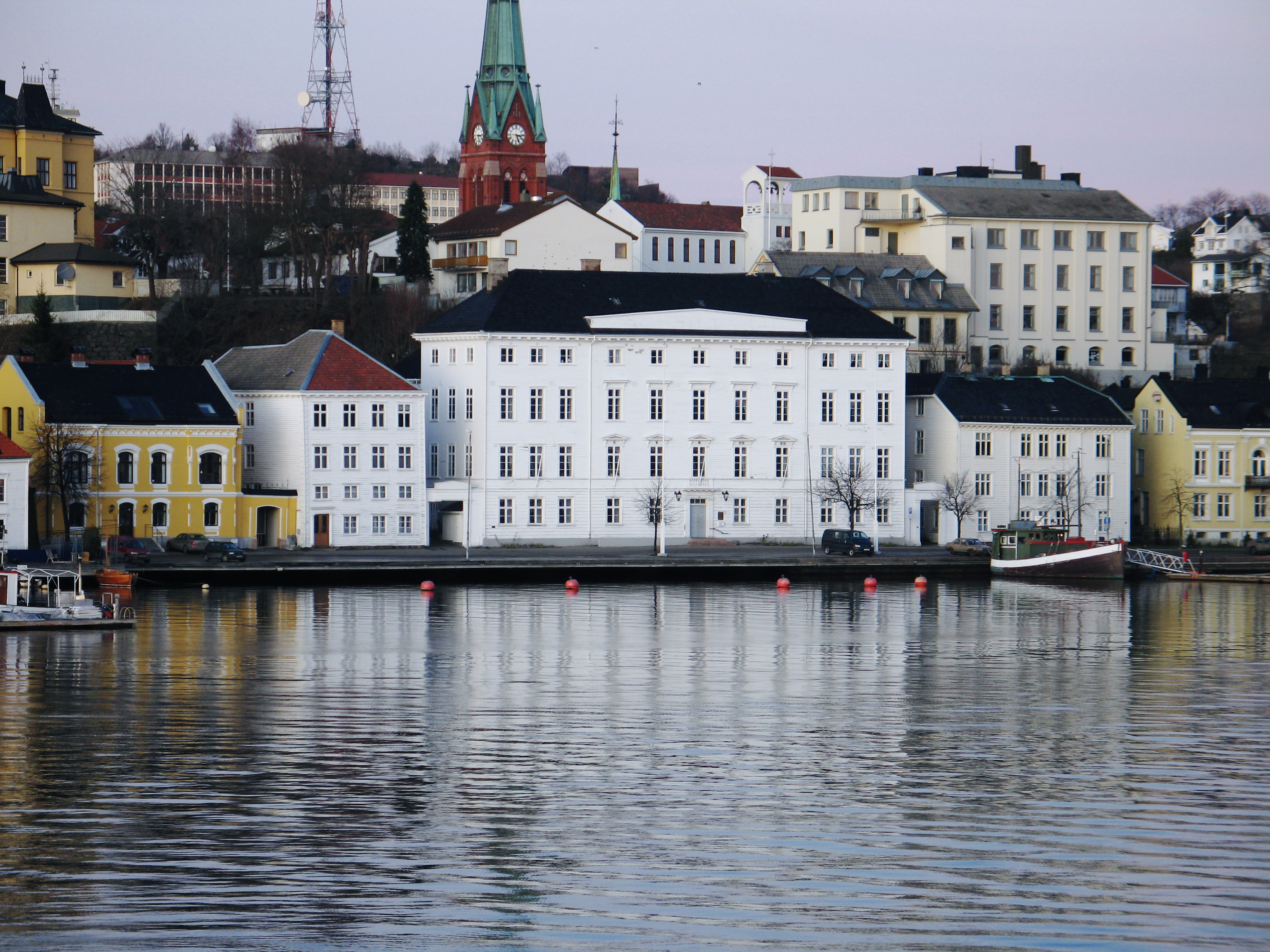 Arendal gamle rådhus - eller Kallevigs pale. The Old City Hall. Oppført 1813.